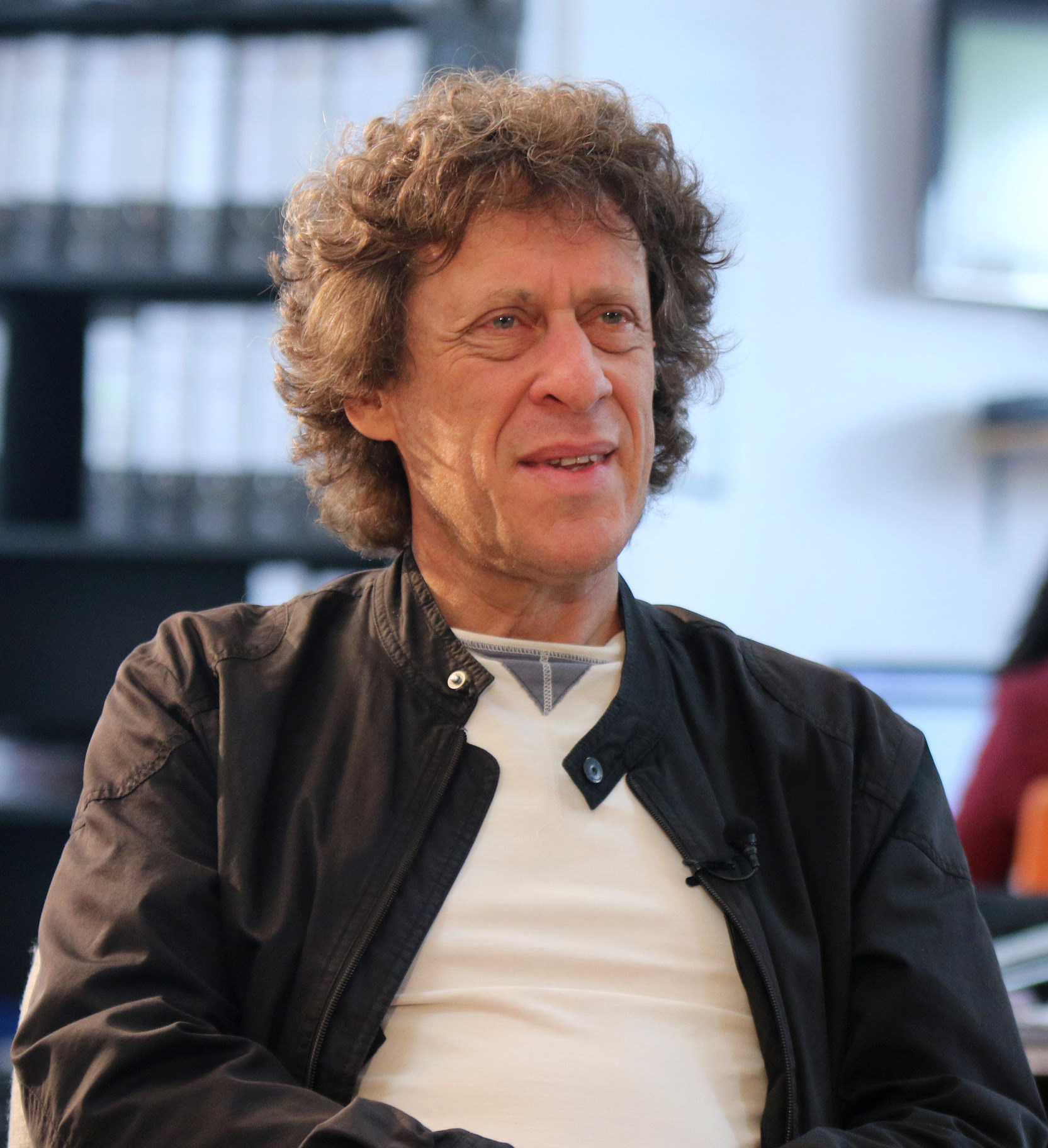 Pedro Brieger entrevistado por Marco Antonio Bravo.